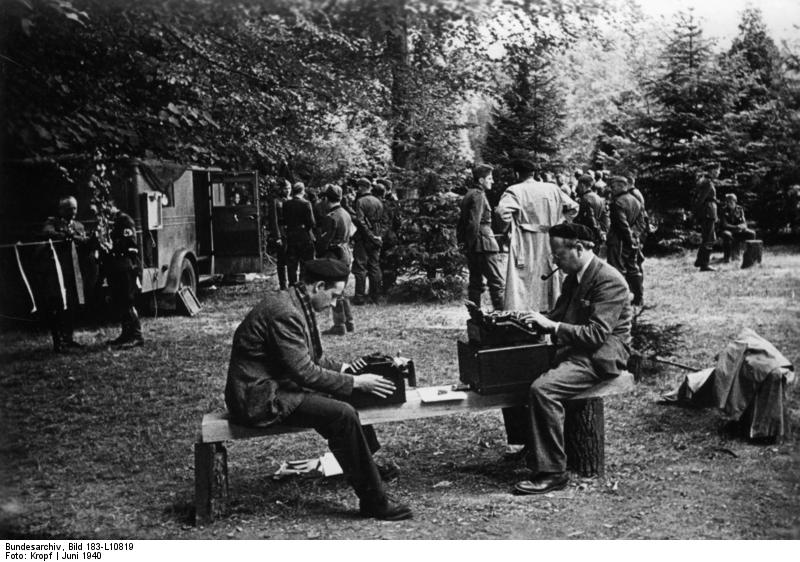 Waffenstillstand von Compiègne, Berichterstatter Scherl: Krieg im Westen (Frankreich): Berichterstatter im Walde von Compiegne. PK.-Aufnahme: Kriegsberichter: Kropf (Sch) 5318-40 "Fr.f.D." "Fr.OKW" Juni 40 ADN-Bildarchiv II. Weltkrieg: Waffenstillstandsverhandlungen mit Frankreich im Wald von Compiegne.- Als Berichterstatter der amerikanische Journalist William L. Shirer (r.), von 1925-1940 Korrespondent verschiedener USA-Zeitungen und Rundfunkstationen in Berlin. [Frankreich, Compiègne.- Deutsch-französische Waffenstillstandsverhandlungen.- Ausländische Journalisten; 21./22.06.1940]